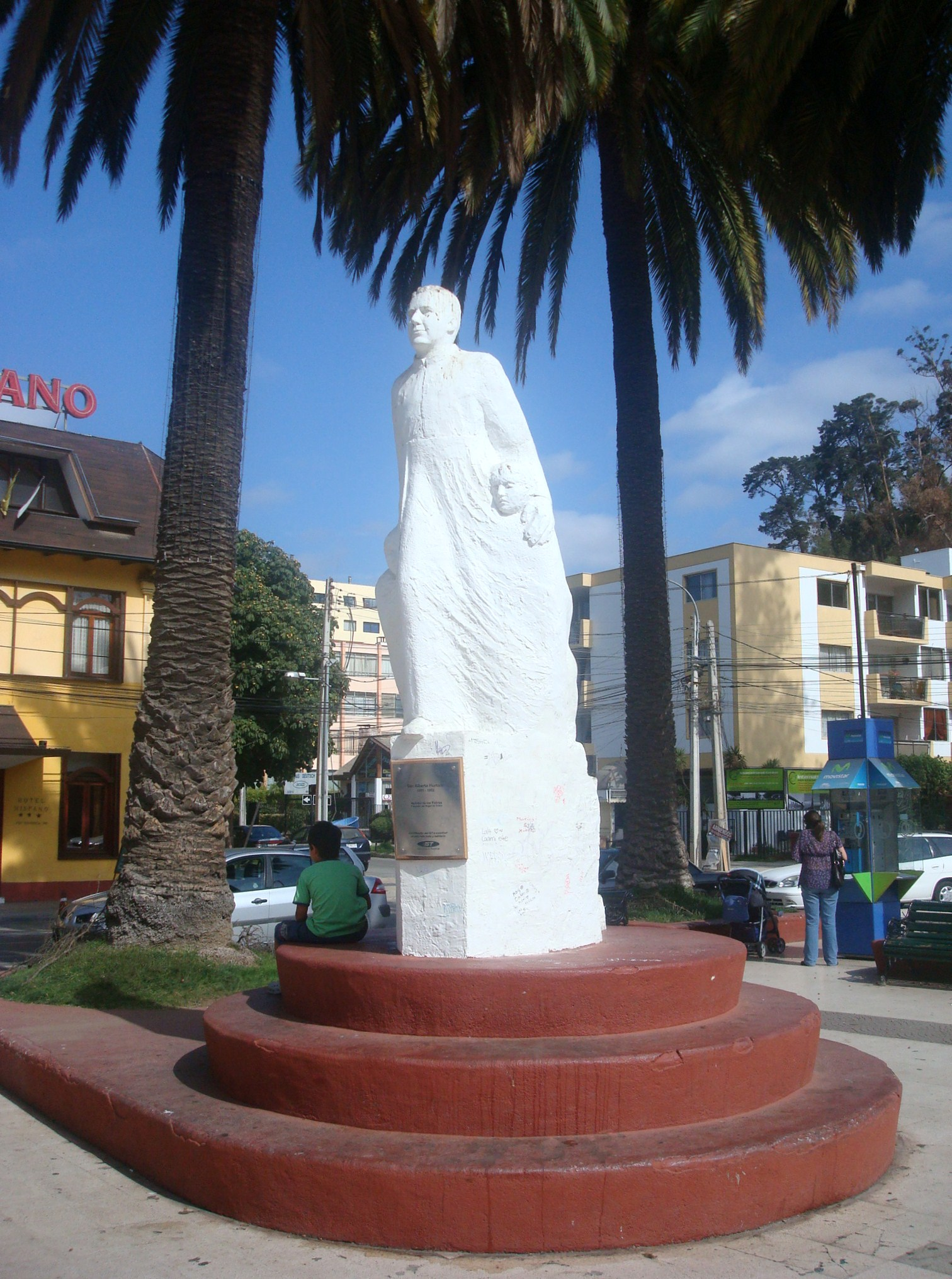 Monumento Alberto Hurtado, Plaza Eduardo Grove, Viña del Mar, Chile